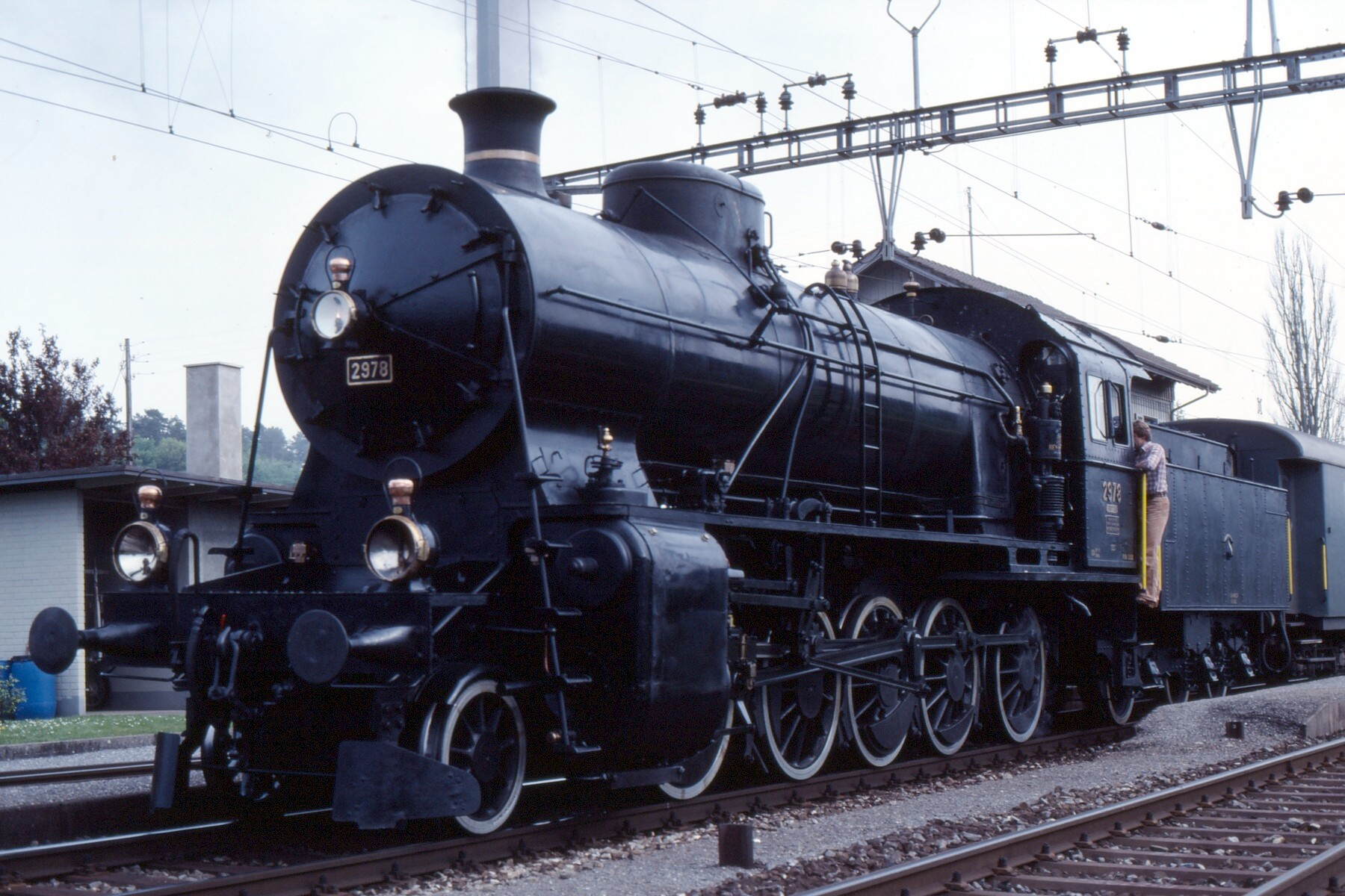 SBB C 5/6 in Thalheim-Altkon Swiss Steam